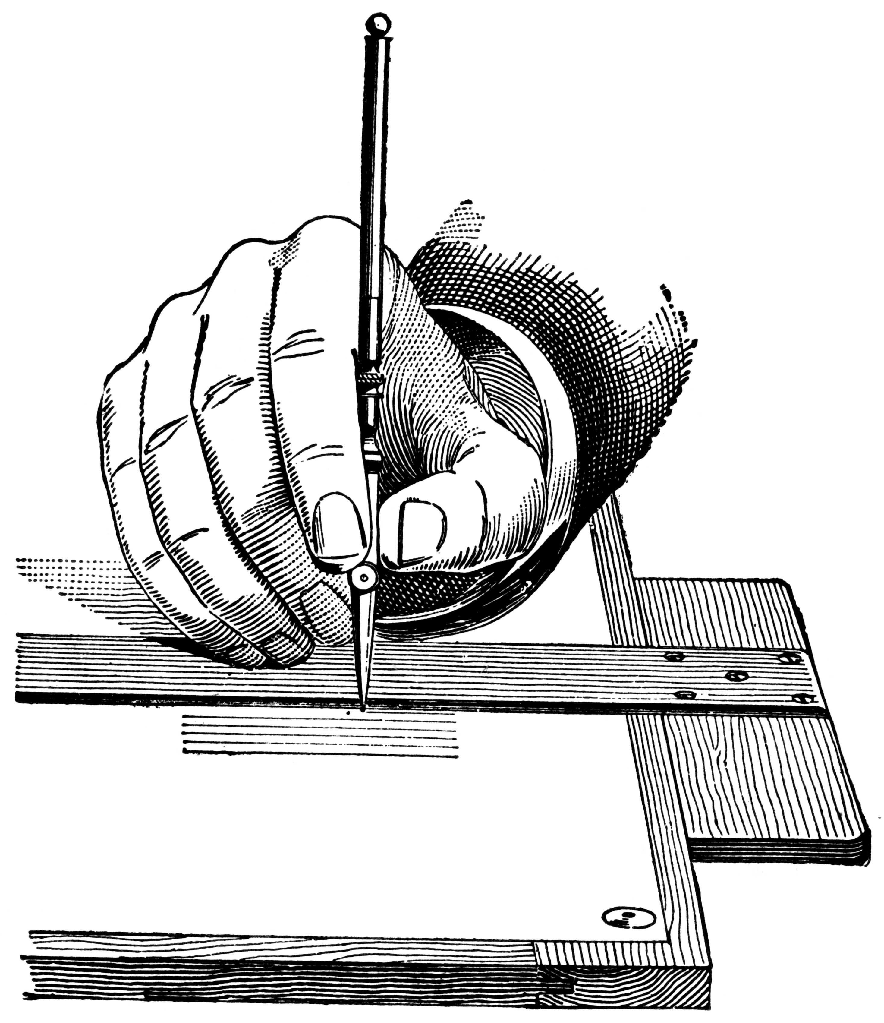 Holding a Ruling Pen.